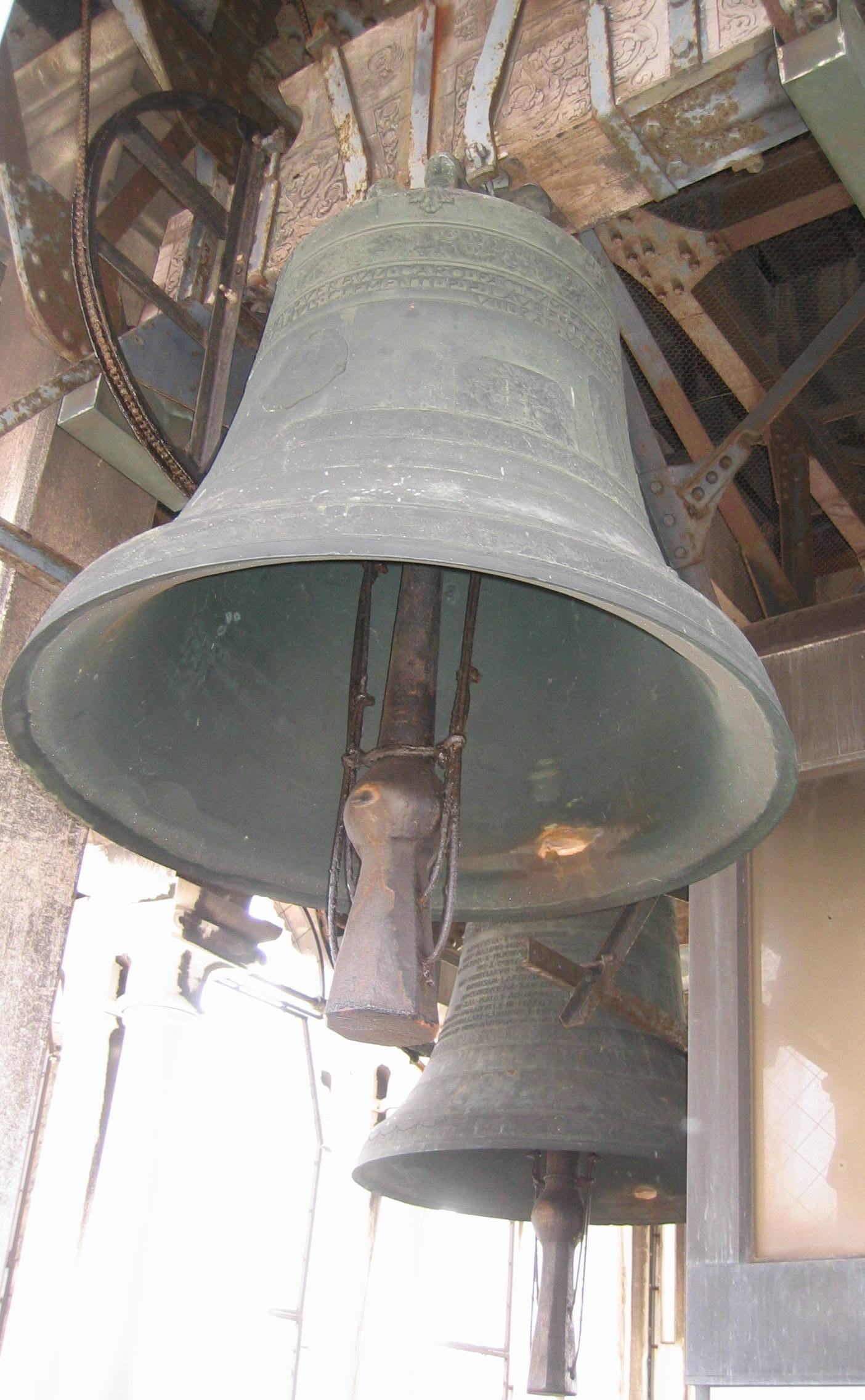 two bells